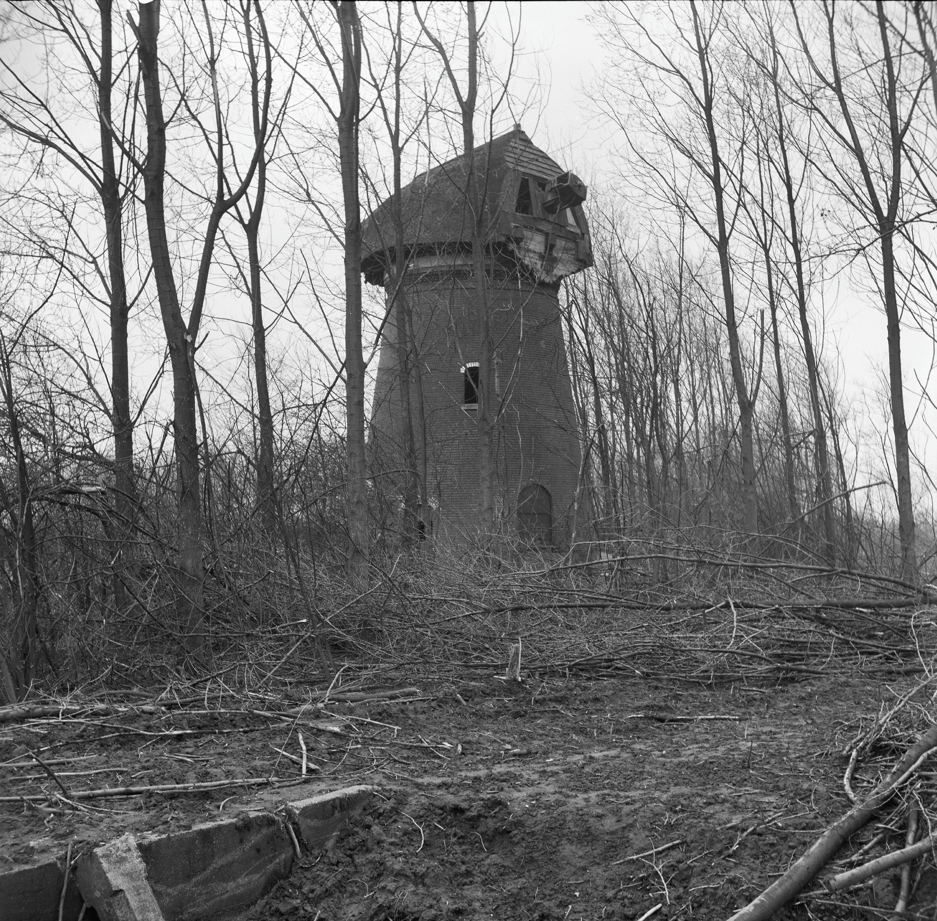 watermolen van de polder Johannissenland